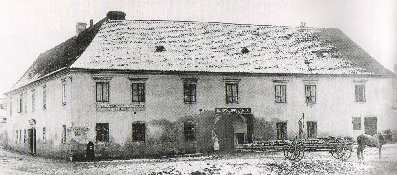 BESEDA